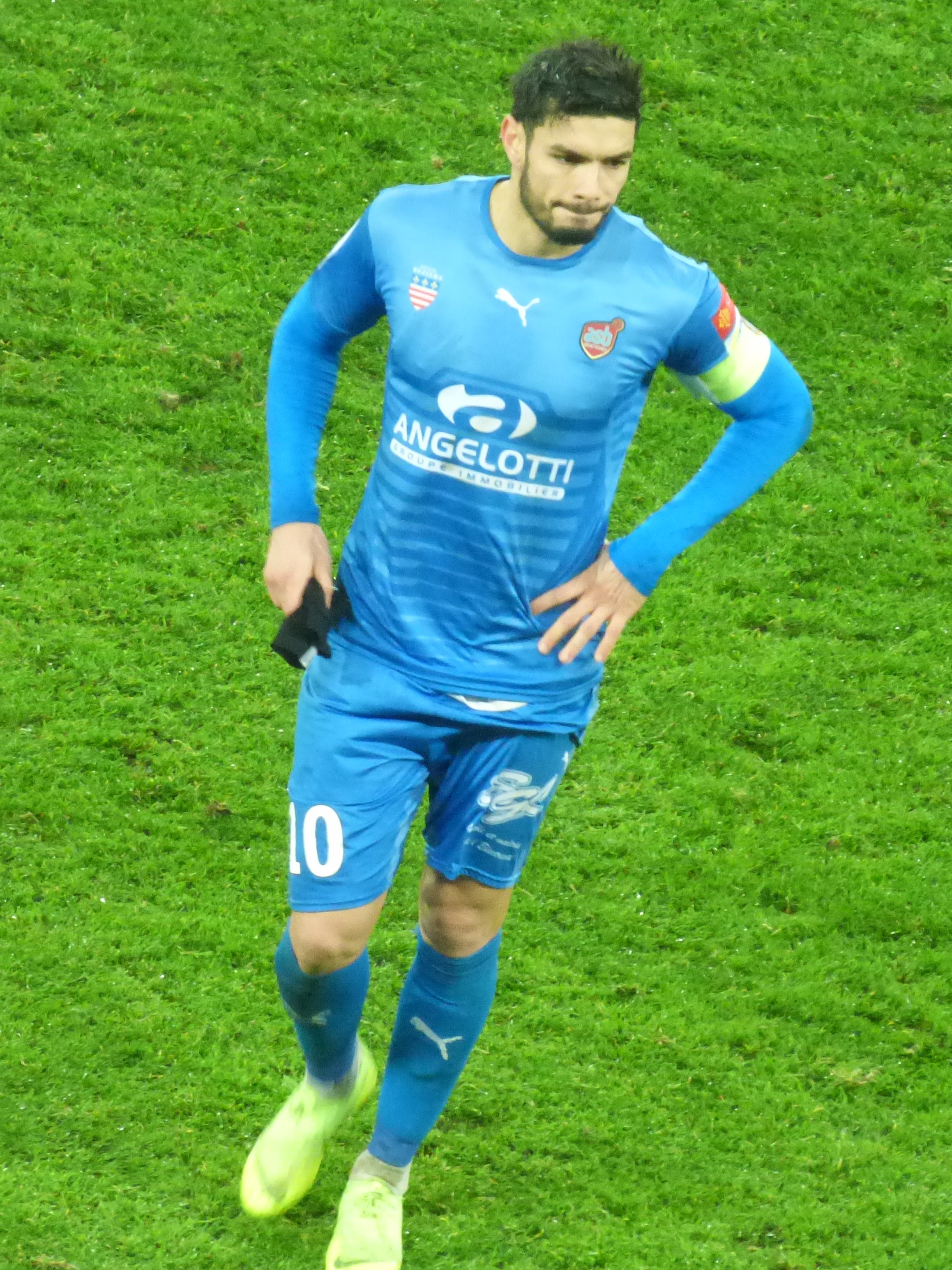 Rédah Atassi après le match RC Lens / AS Béziers, comptant pour la 23ème journée du championnat de France de football de Ligue 2 2018-2019, le 4 février 2019, au Stade Bollaert-Delelis.